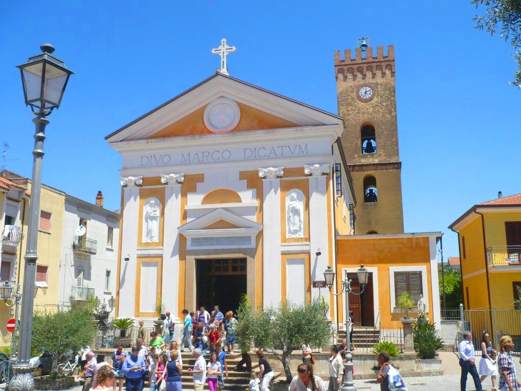 la chiesa di s.marco evangelista a s.marco di castellabate (salerno)